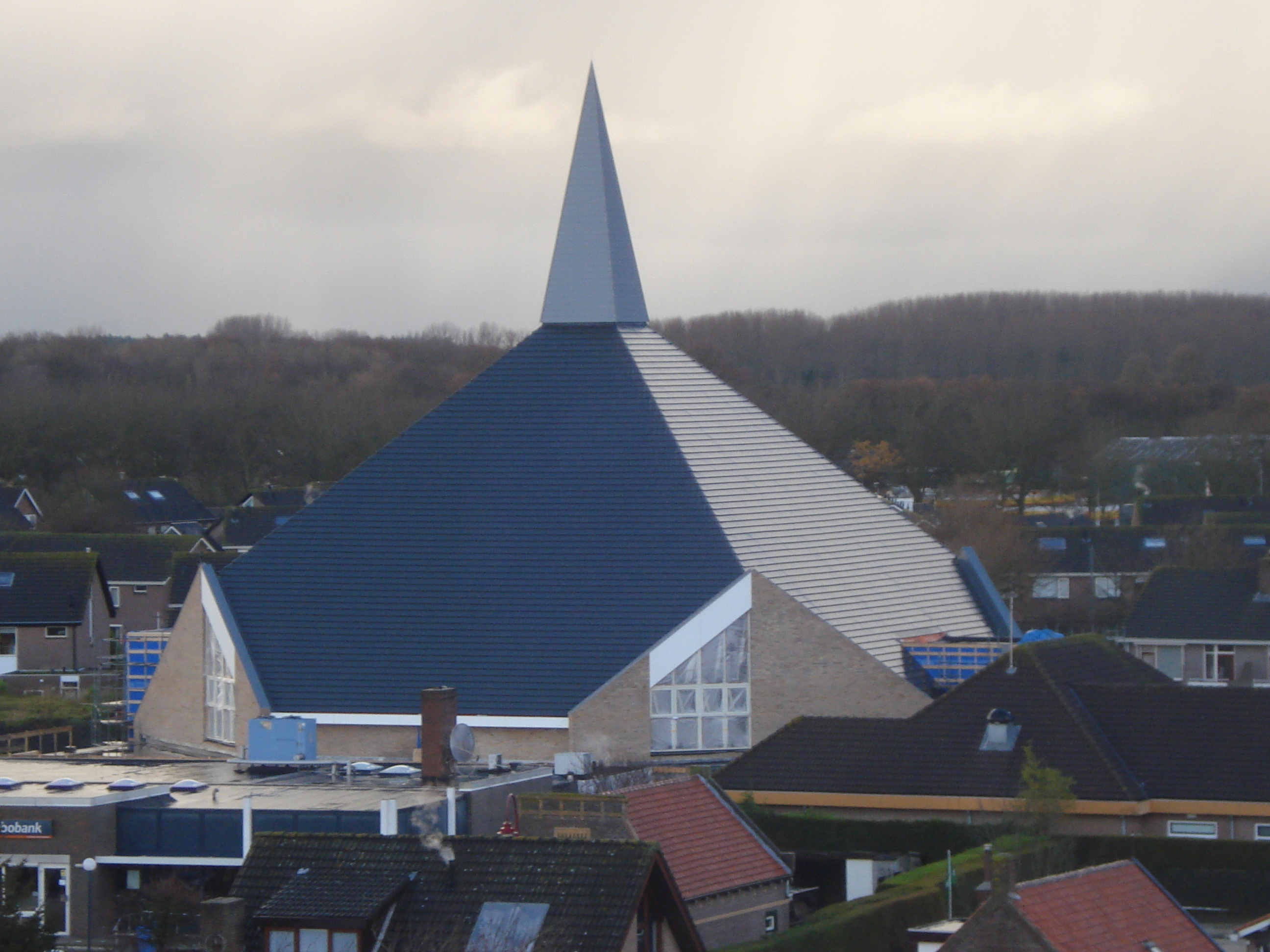 Zicht op een deel van de bovenkant van de Eben-Haëzerkerk (Ouddorp) in Ouddorp op Goeree-Overflakkee. Gezien vanaf de kerktoren van de Dorpskerk Sint Maarten (Ouddorp)